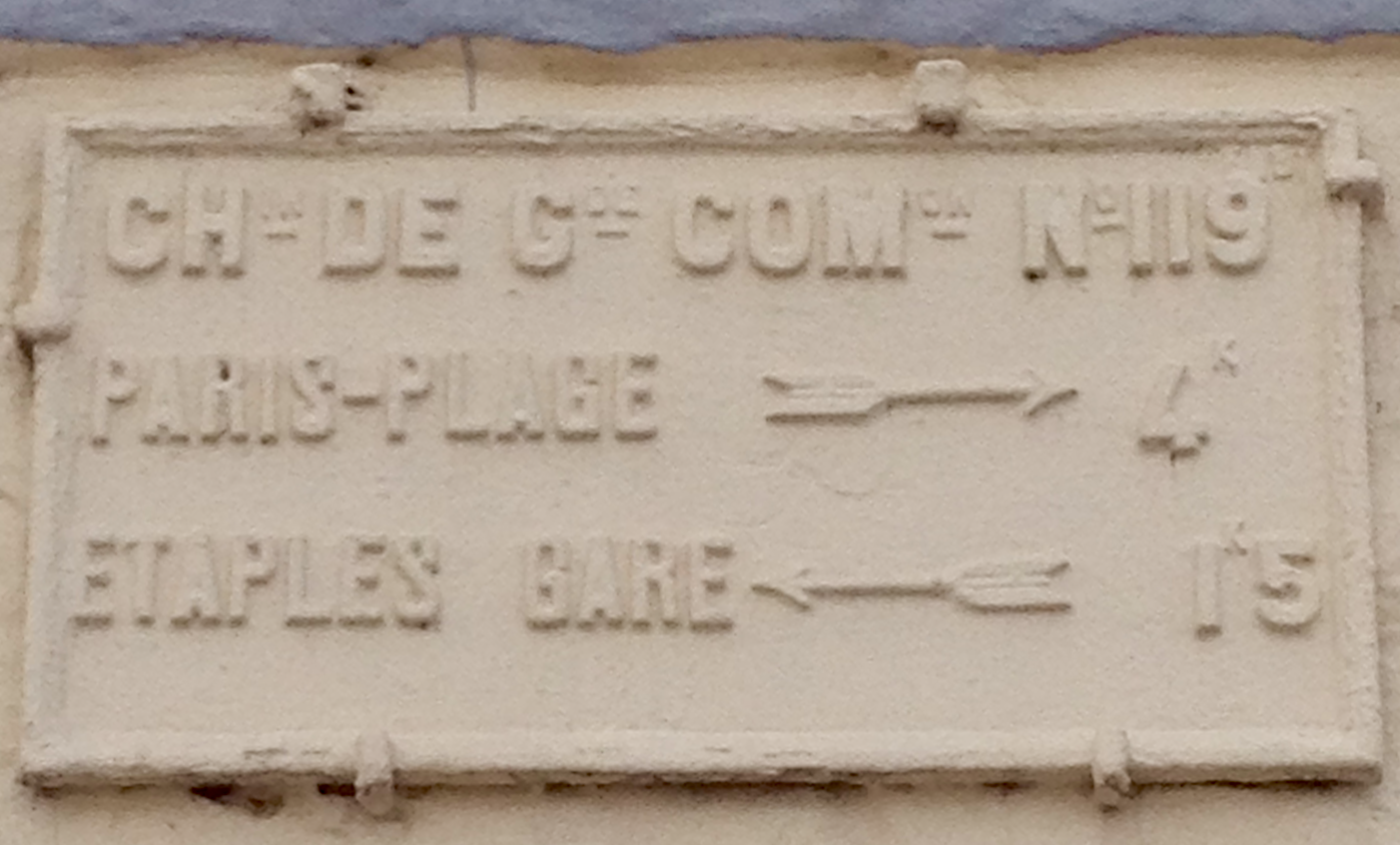 Le Touquet-Paris-Plage Panneau de signalisation directionnelle - chemin de grande communication n°119 - posé à l'angle de l' avenue de l'Aéroport et de l'avenue d’Étaples à Trépied-Cucq 2